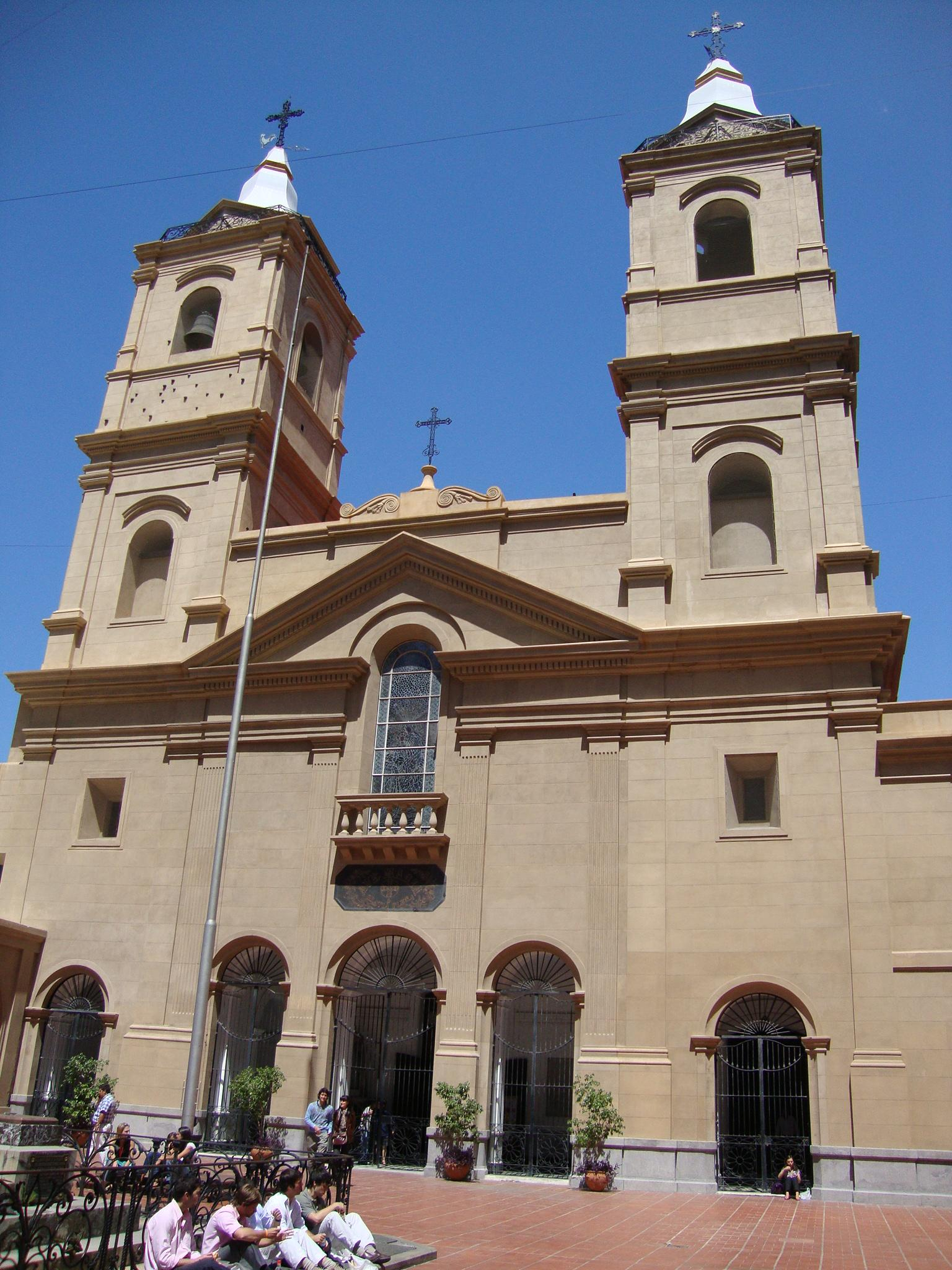 Basílica de Nuestra Señora del Rosario, en el Convento de Santo Domingo de la ciudad de Buenos Aires, Argentina. Calle Defensa, esquina Avenida Belgrano.